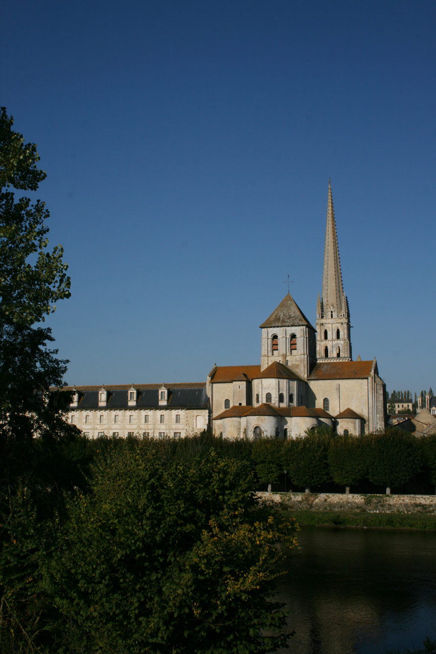 Abbaye de Saint-Savin